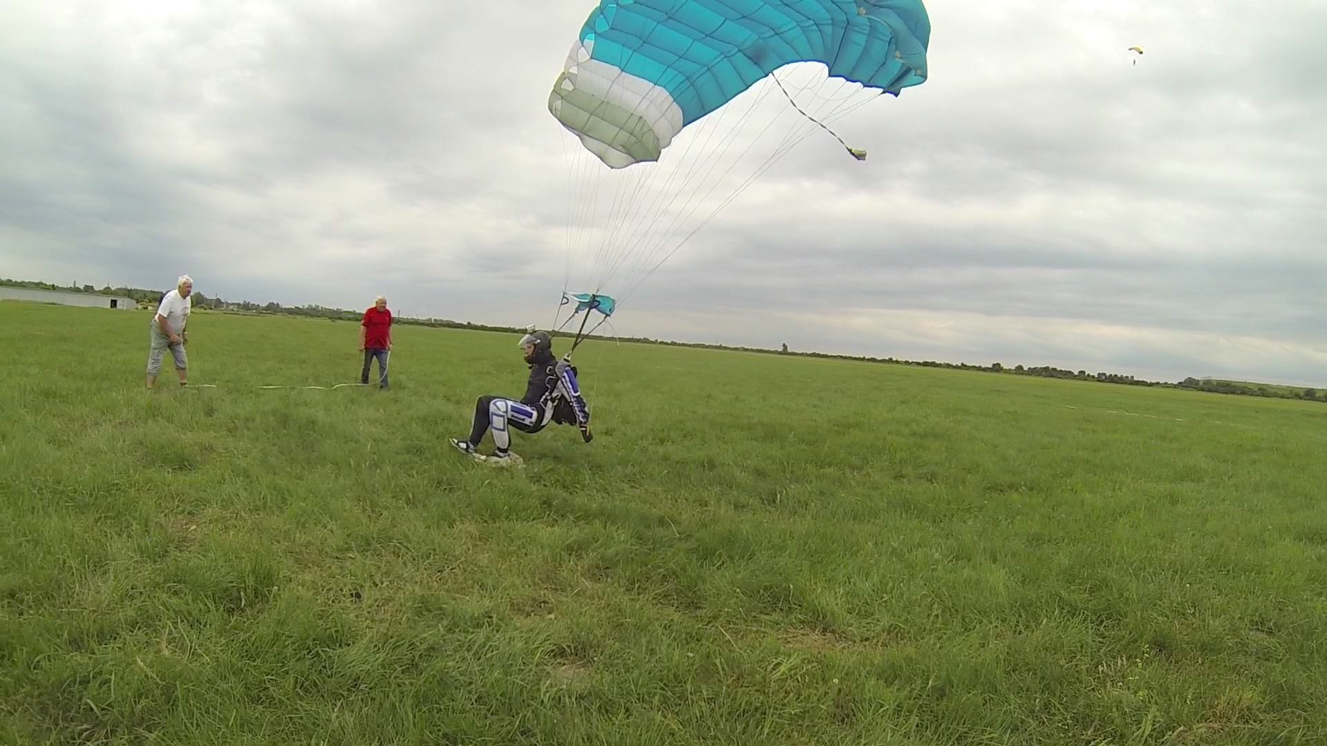 Spadochronowe Mistrzostwa Śląska 2016, Tymoteusz Tabor ląduje w „centro“ — Sekcja Spadochronowa Aeroklubu Gliwickiego